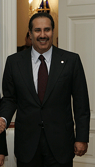 Hamad bin Jassim bin Jaber Al Thani, Qatari politician